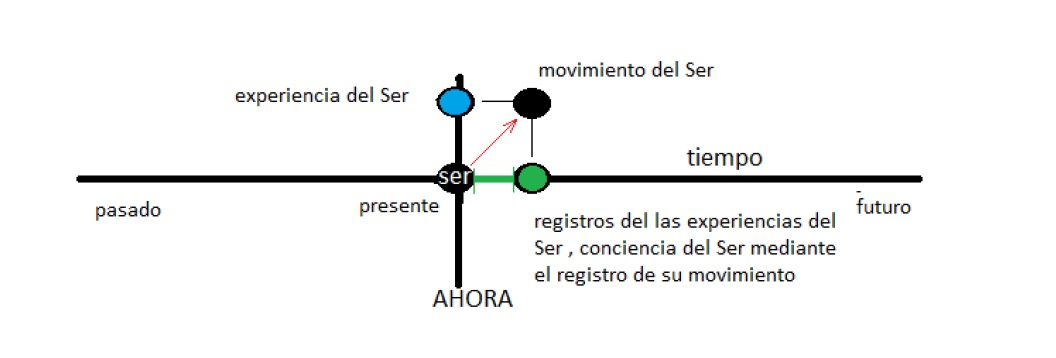 El Ser y su movimiento a futuro